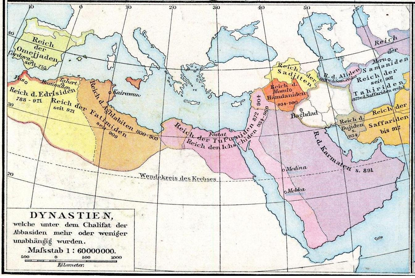 Das Reich der Kalifen bis 945. Karte aus dem Historischen Handatlas von Gustav Droysen, 1886